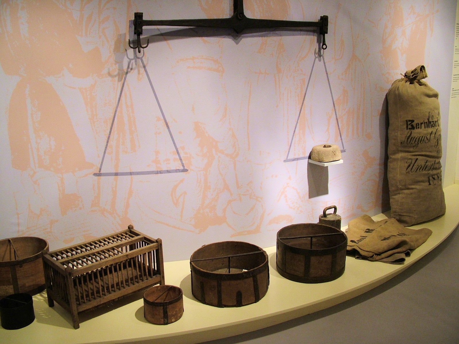 Im Stadtmuseum Wendlingen am Neckar finden Dauer- und Sonderausstellungen statt